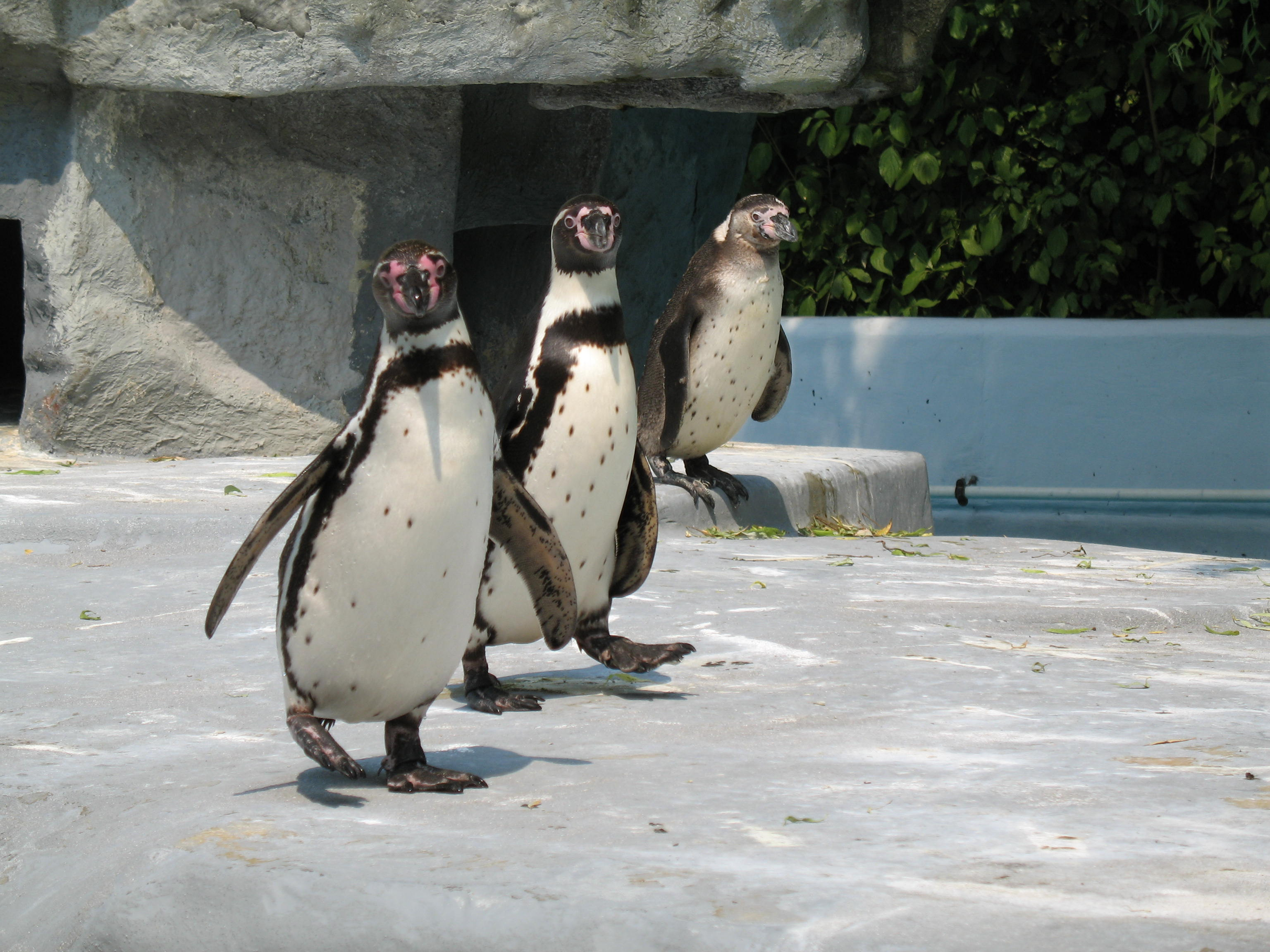 drei Humboldtpinguine im Kölner Zoo / three humboldt penguins in Cologne zoo